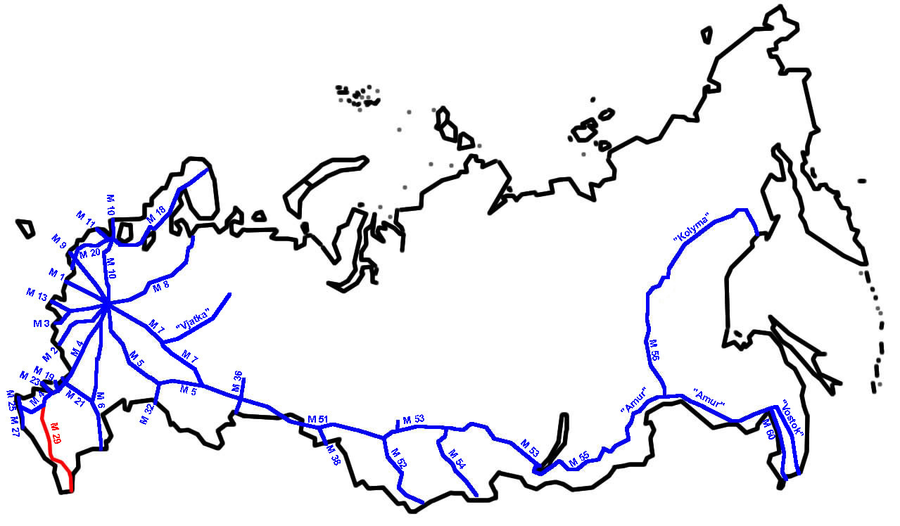 M29 im russischen Fernstraßennetz